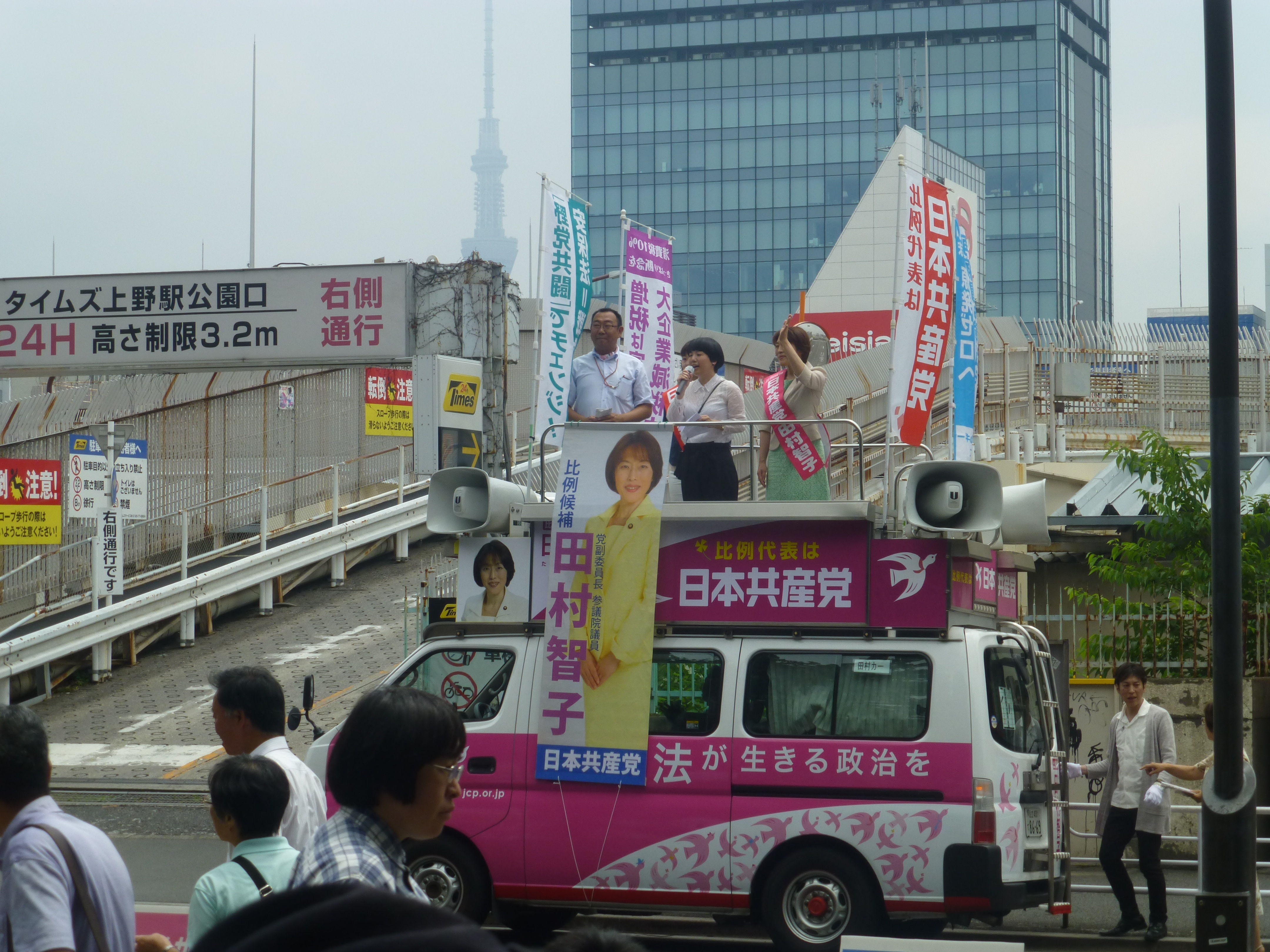 田村 智子（たむら ともこ、Tomoko Tamura、1965年7月4日 - ）は、日本の政治家。日本共産党所属の参議院議員（1期）。